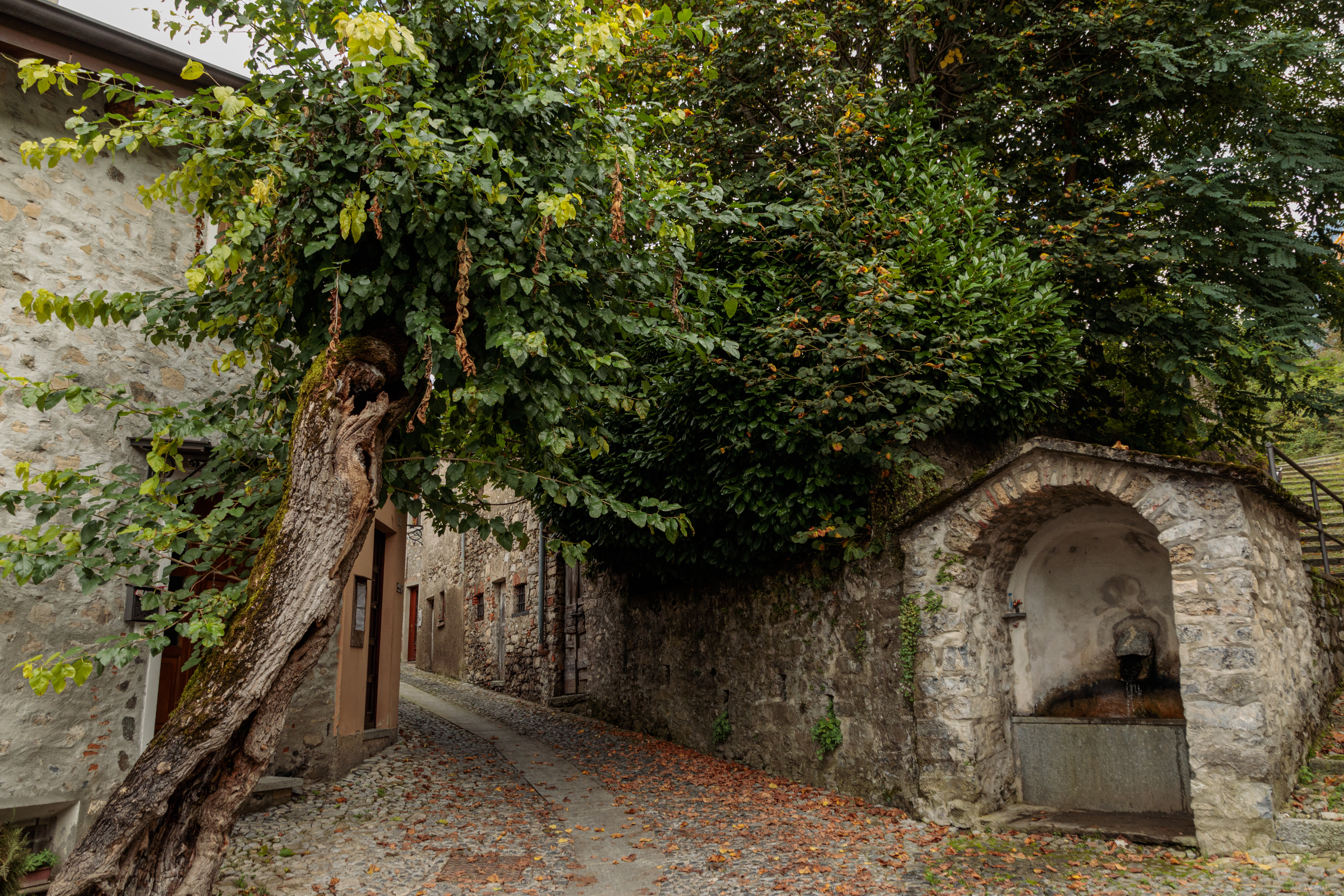 Fonatana pubblica This is a photo of a monument which is part of cultural heritage of Italy.